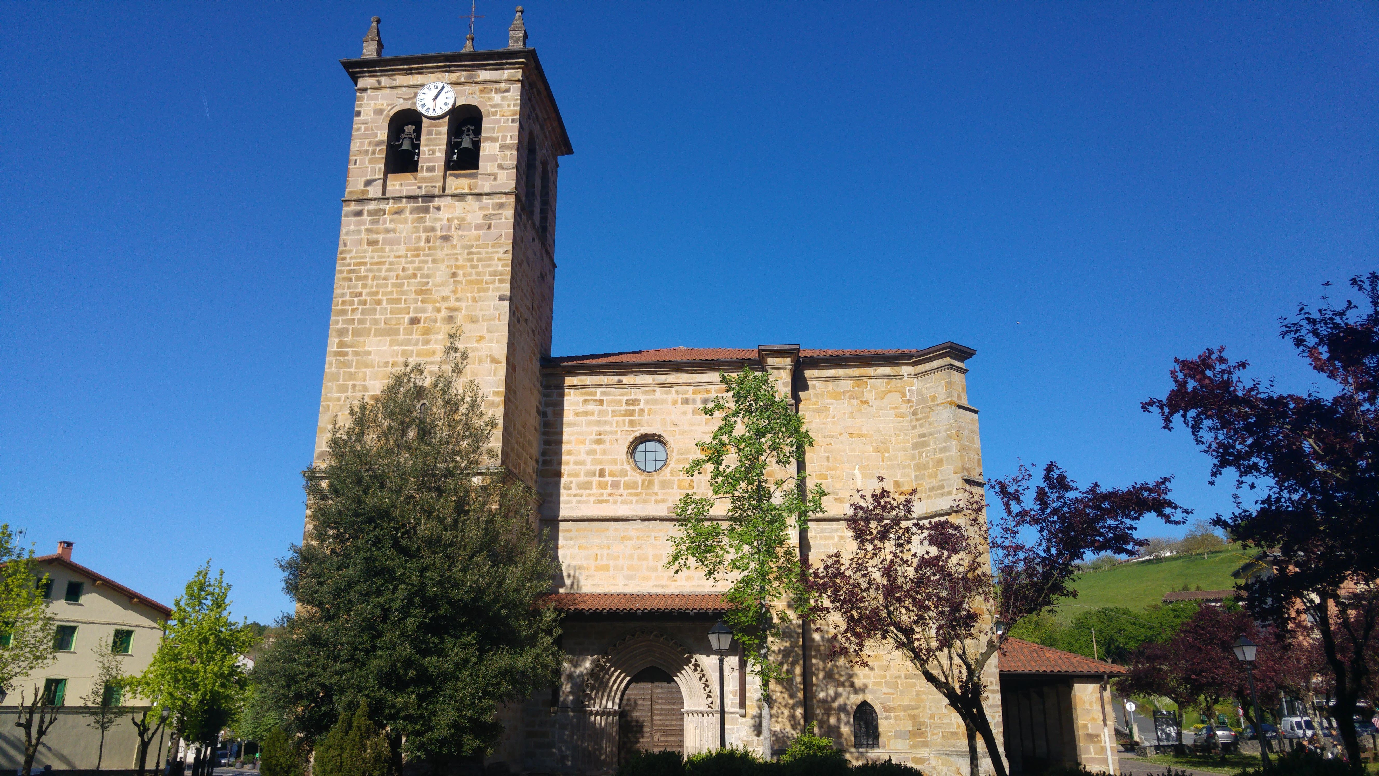 Iglesia de Idiazabal